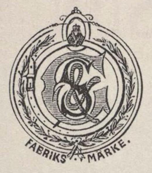 Logo der Firma "Grumme & Son."